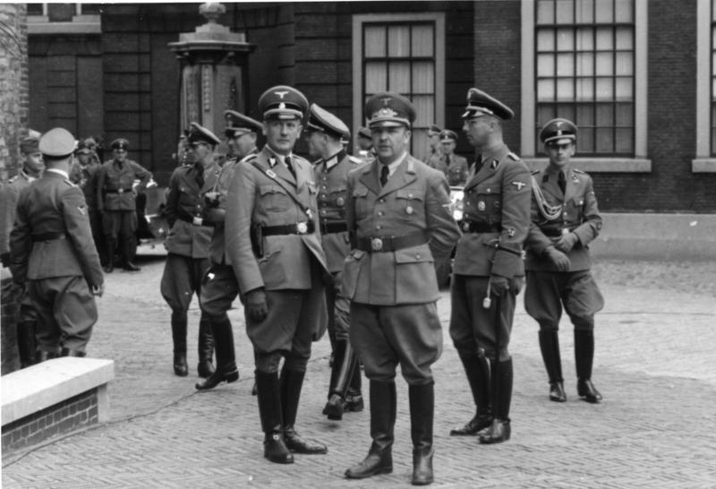 Staatssekretär Wimmer u. ein ORR des RProp.min. Den Haag 1940